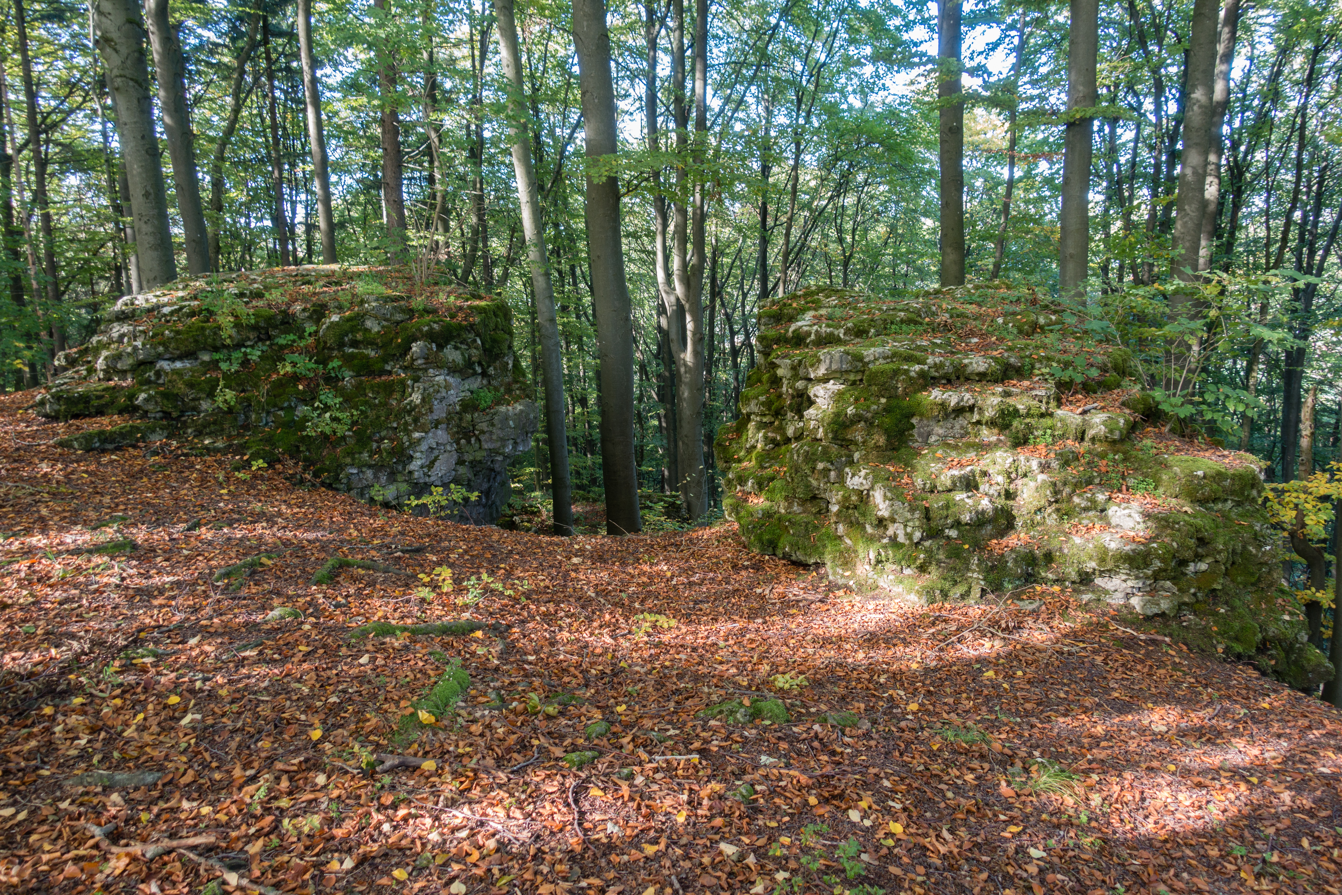 Burgstall Keilberg, Abschnittswall, Naturdenkmal, Offenhausen